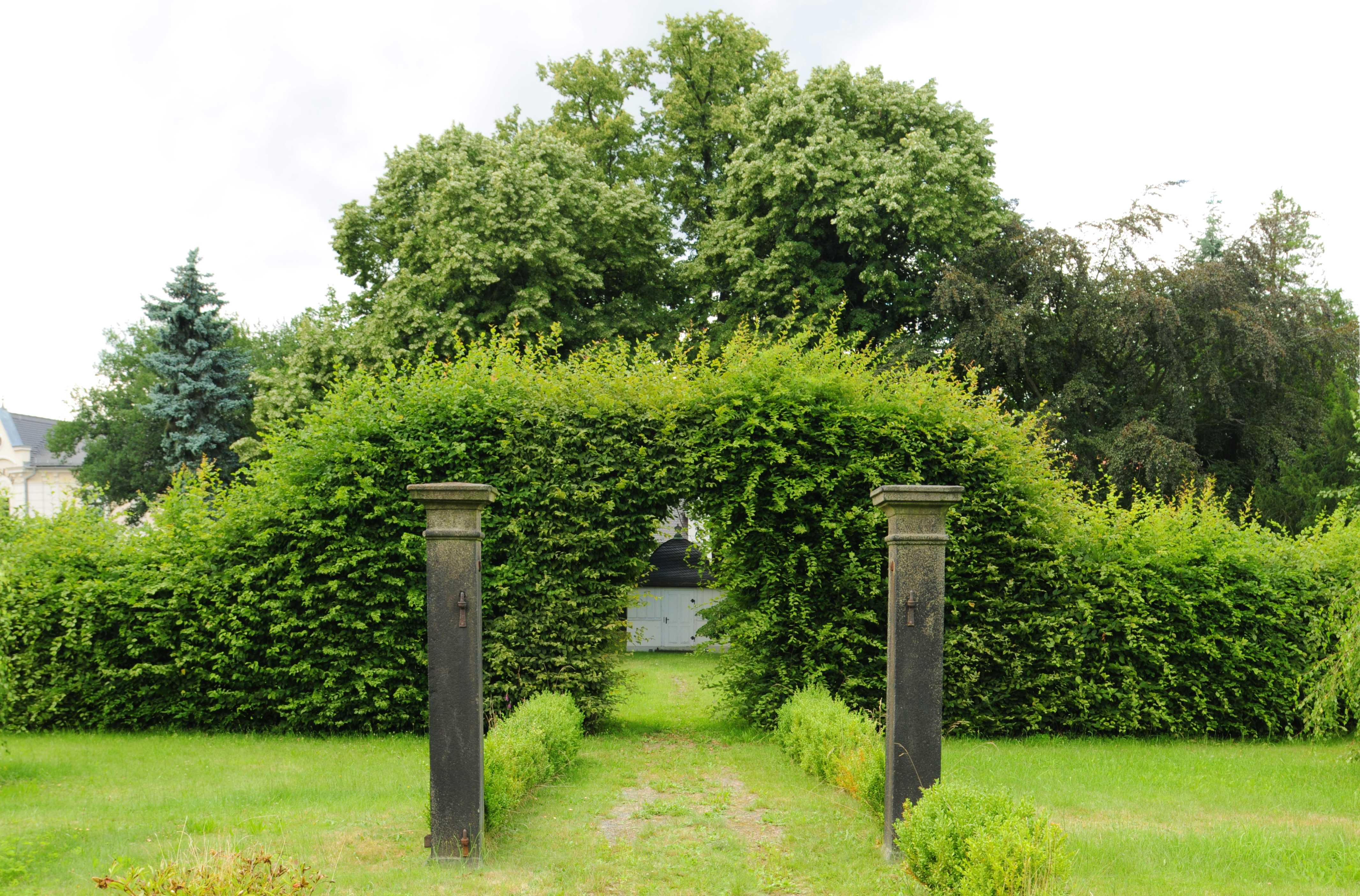 Herrnhut, Dürningergarten, August-Bebel-Str. (Landkreis Görlitz, Sachsen, Deutschland)